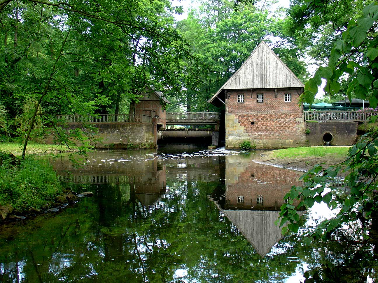 De Haarmühle in Alstätte aan de Alstätter Aa (na de grens Buurserbeek genoemd en vanaf Haaksbergen Schipbeek)